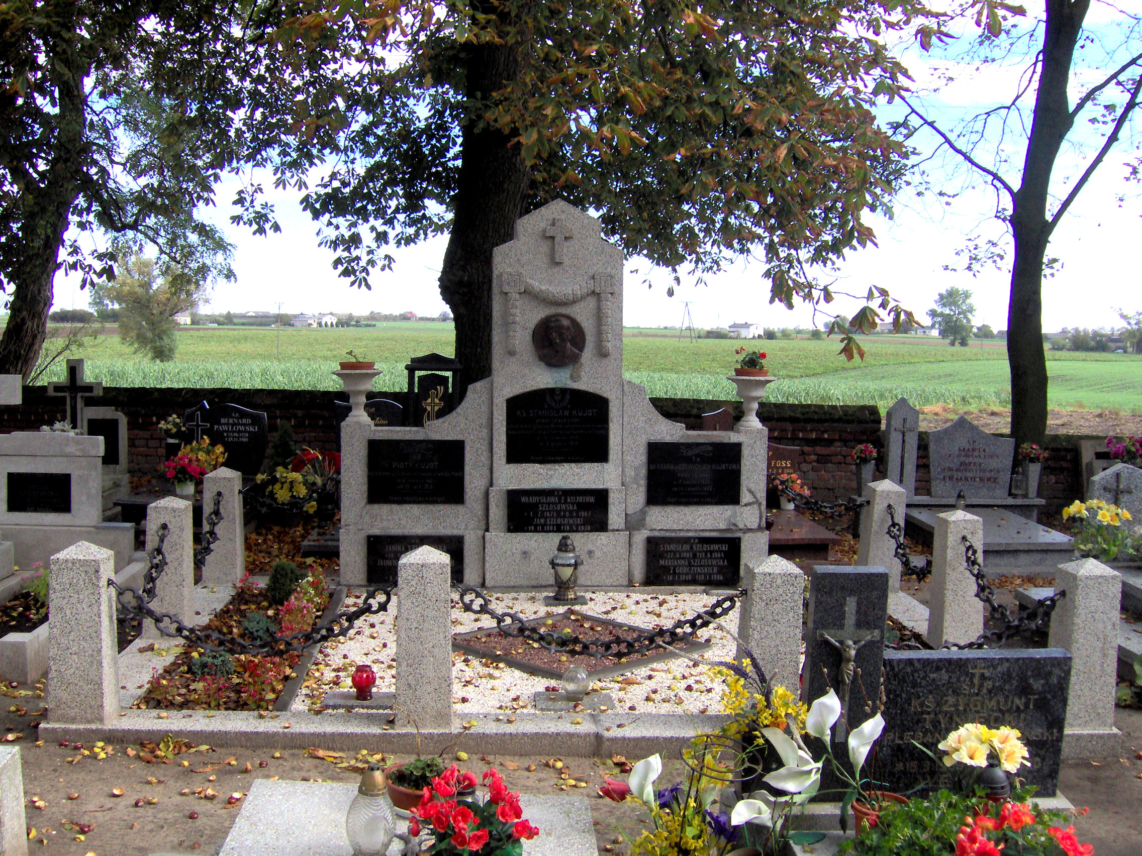 Grobowiec rodzinny Stanisława Kujota w Grzybnie